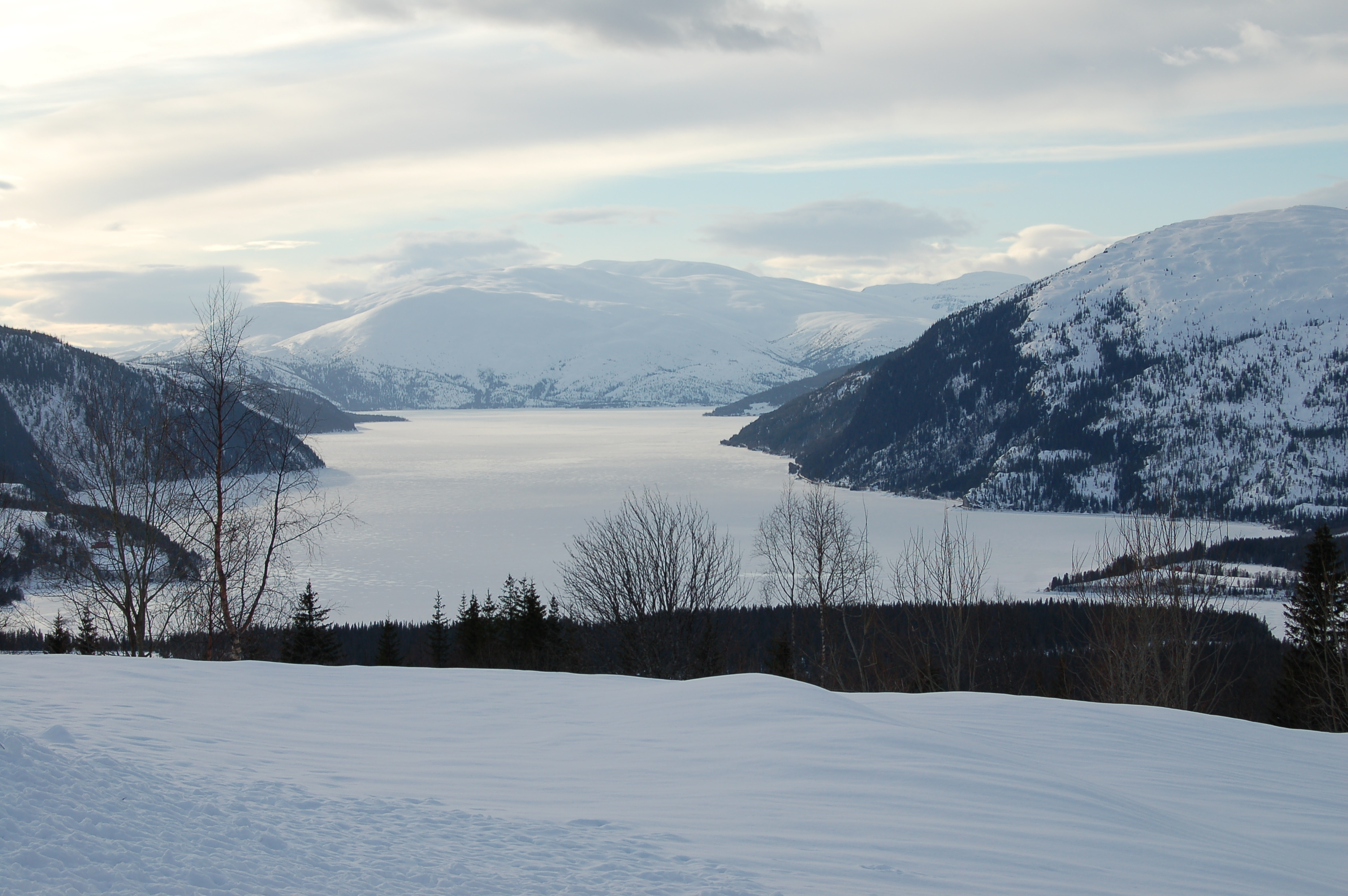 Langvatnet i Rana